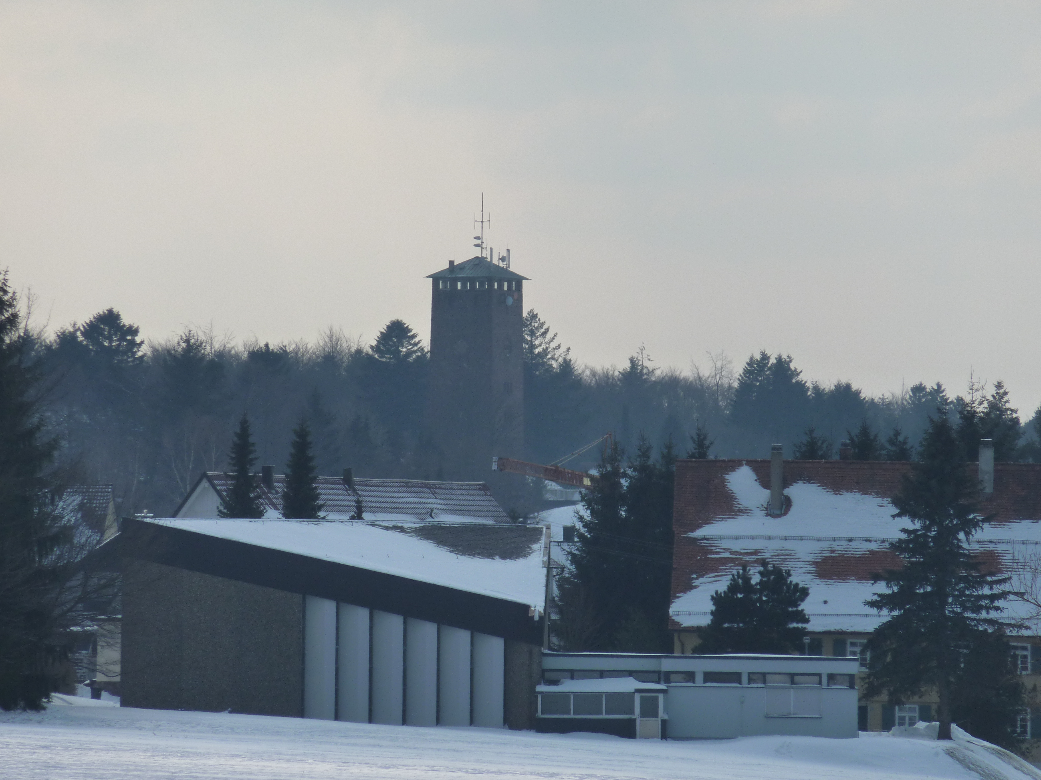 Dobel, Blick zum Wasser- und Aussichtsturm